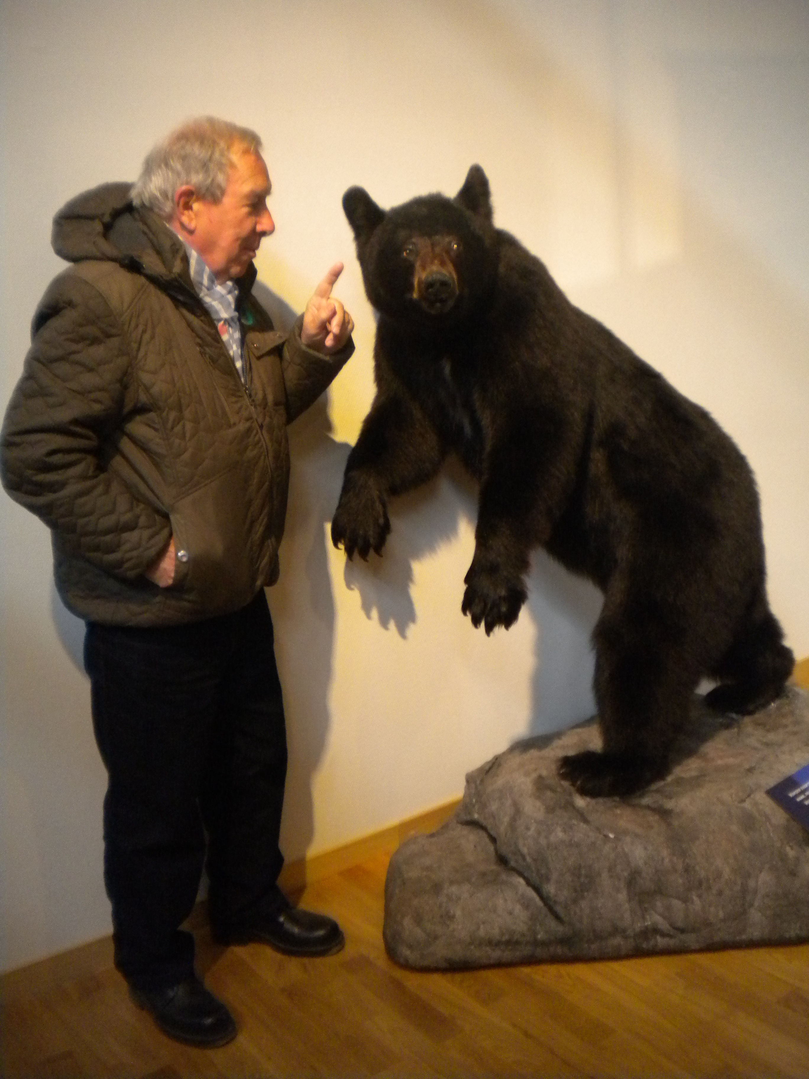 Home visitant el Museu interior d'Alta